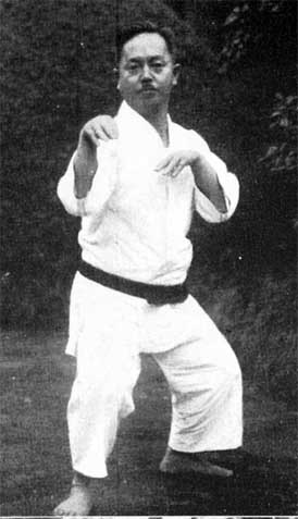 スーパーリンペイを演じる摩文仁賢和(Suparinpei by Mabuni Kenwa, 1934 - 1952)